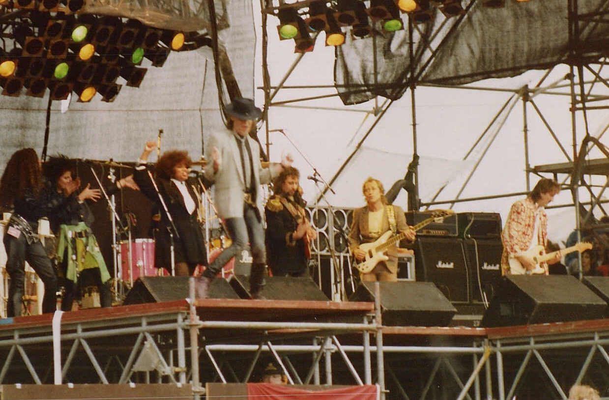 Udo Lindenberg + Band, Rock am Ring 1987